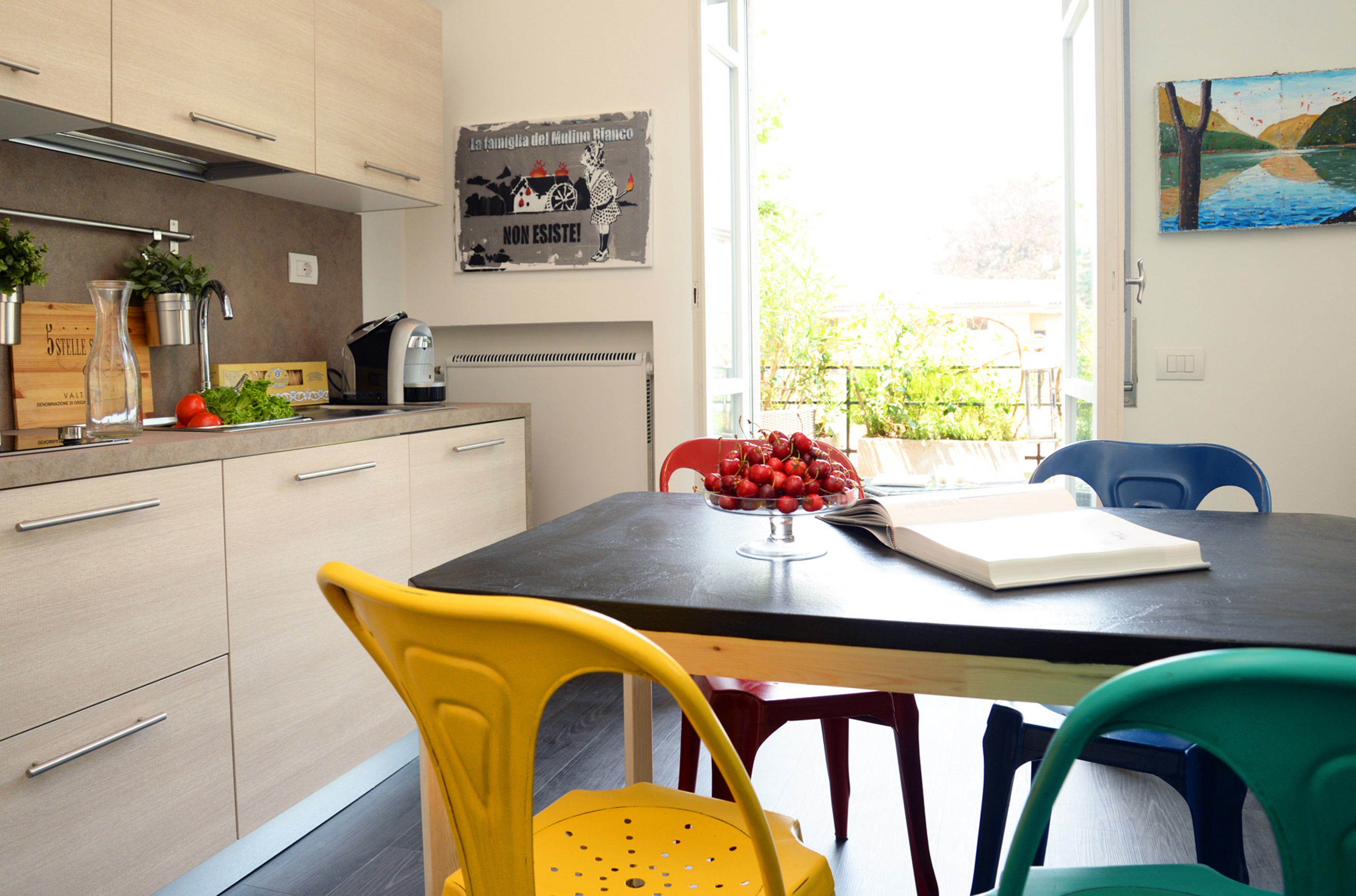 Appartamento Art Design a Como